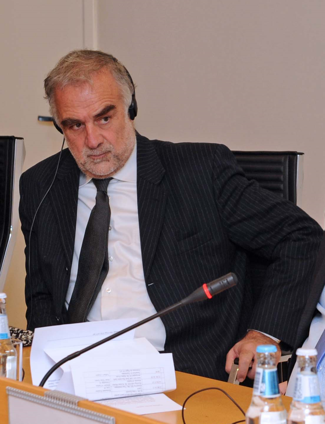 Rahvusvahelise kriminaalkohtu (ICC) peaprokurör Luis Moreno-Ocampo